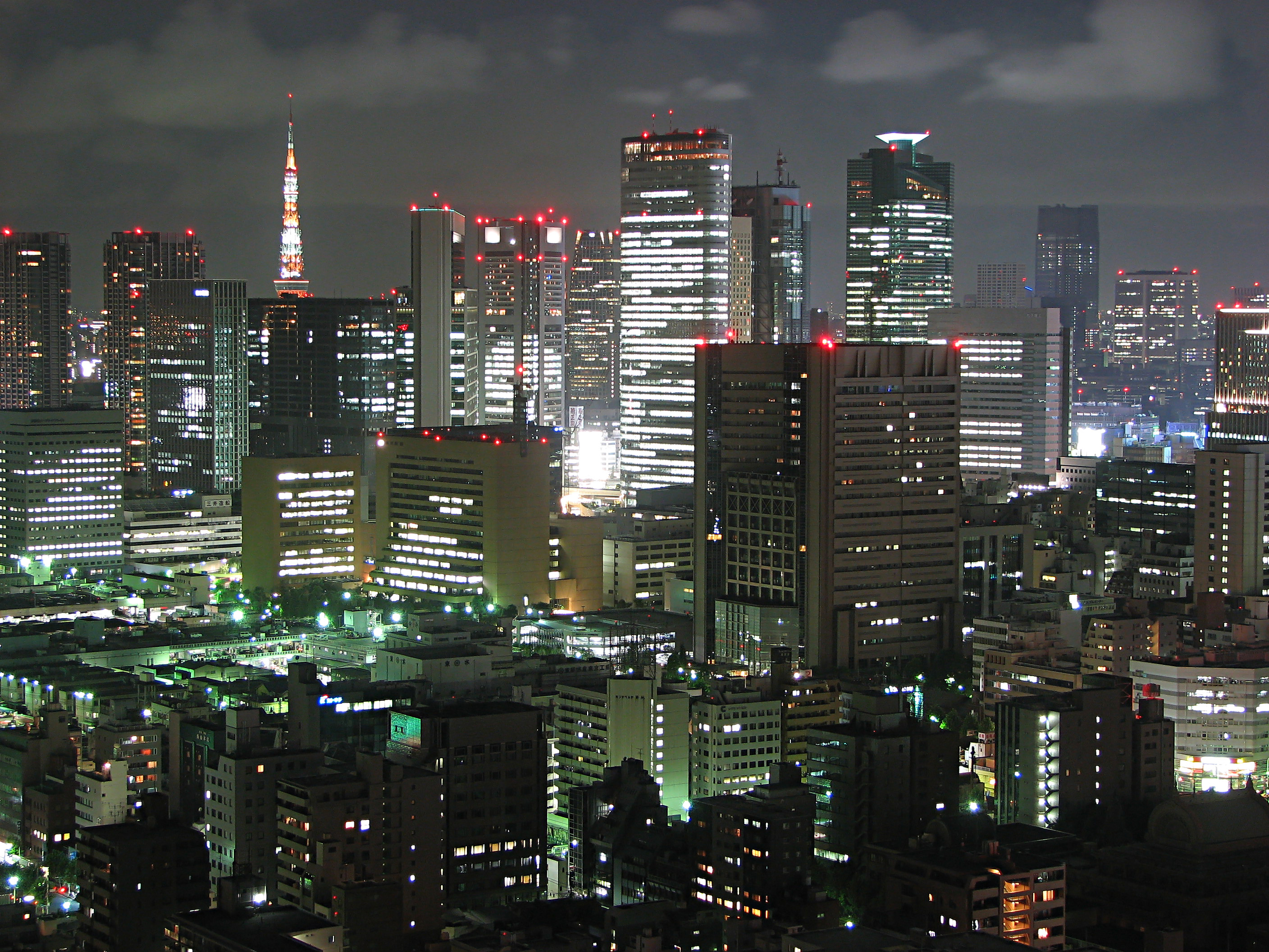 Tokyo night view